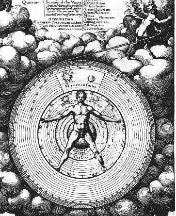 Rorbert Fludd, De Macrocosmi historia.